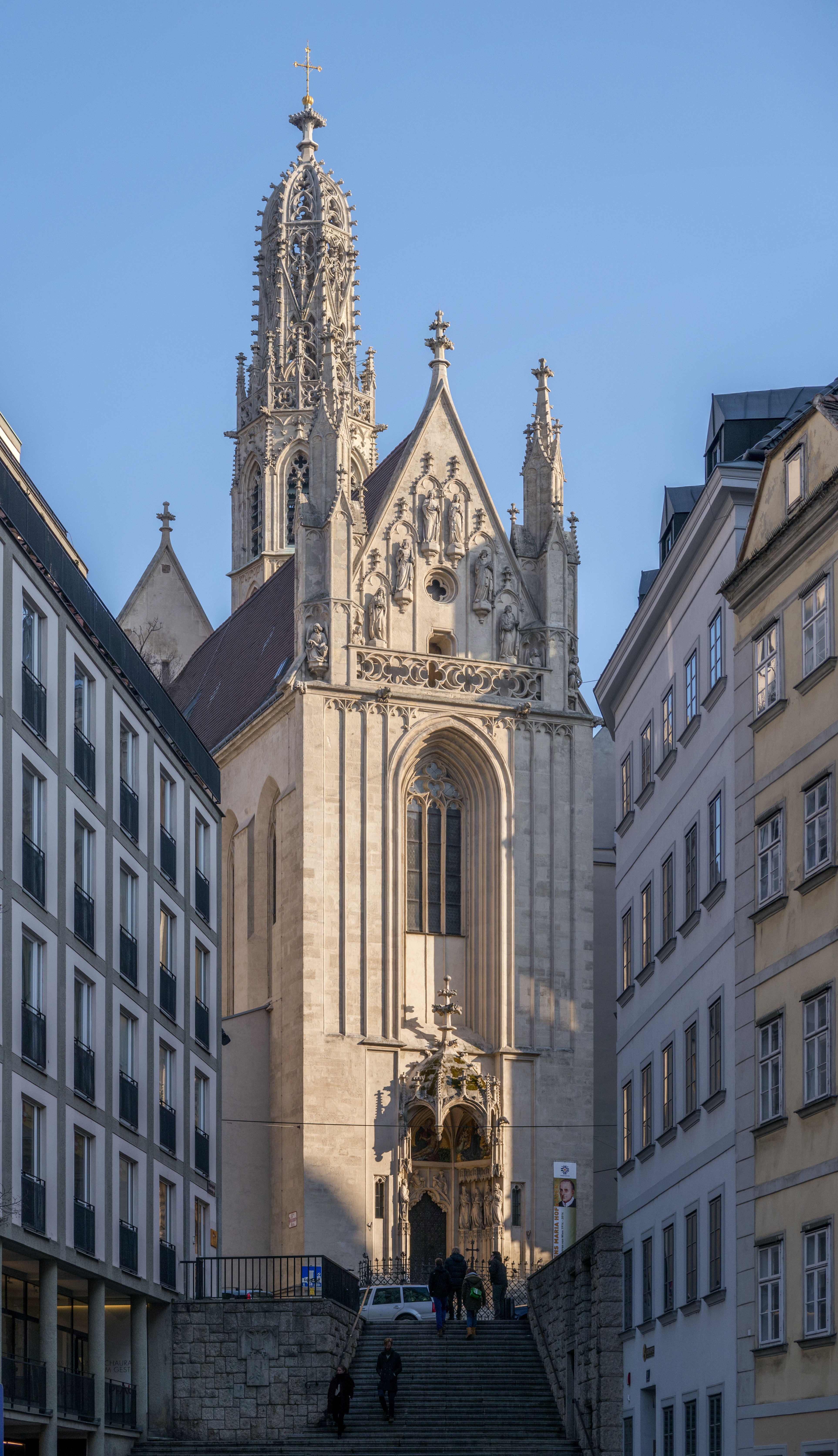 Maria am Gestade, Redemptoristenkirche